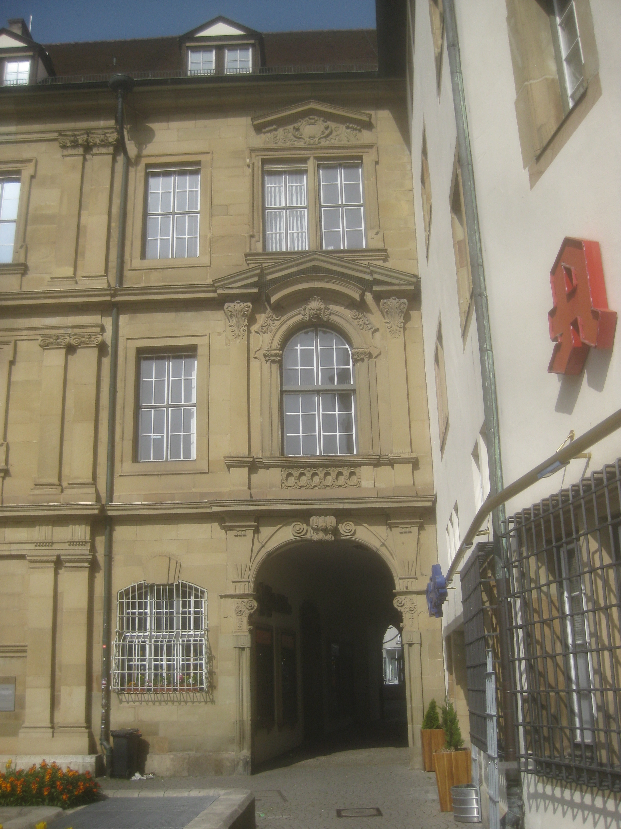 Prinzenbau in Stuttgart, Anbau mit dem Kanzleibogendurchgang an der Stelle, an der es ursprünglich das Tunzhofer Tor gab. Fassade zum Schillerplatz, rechts: Alte Kanzlei.